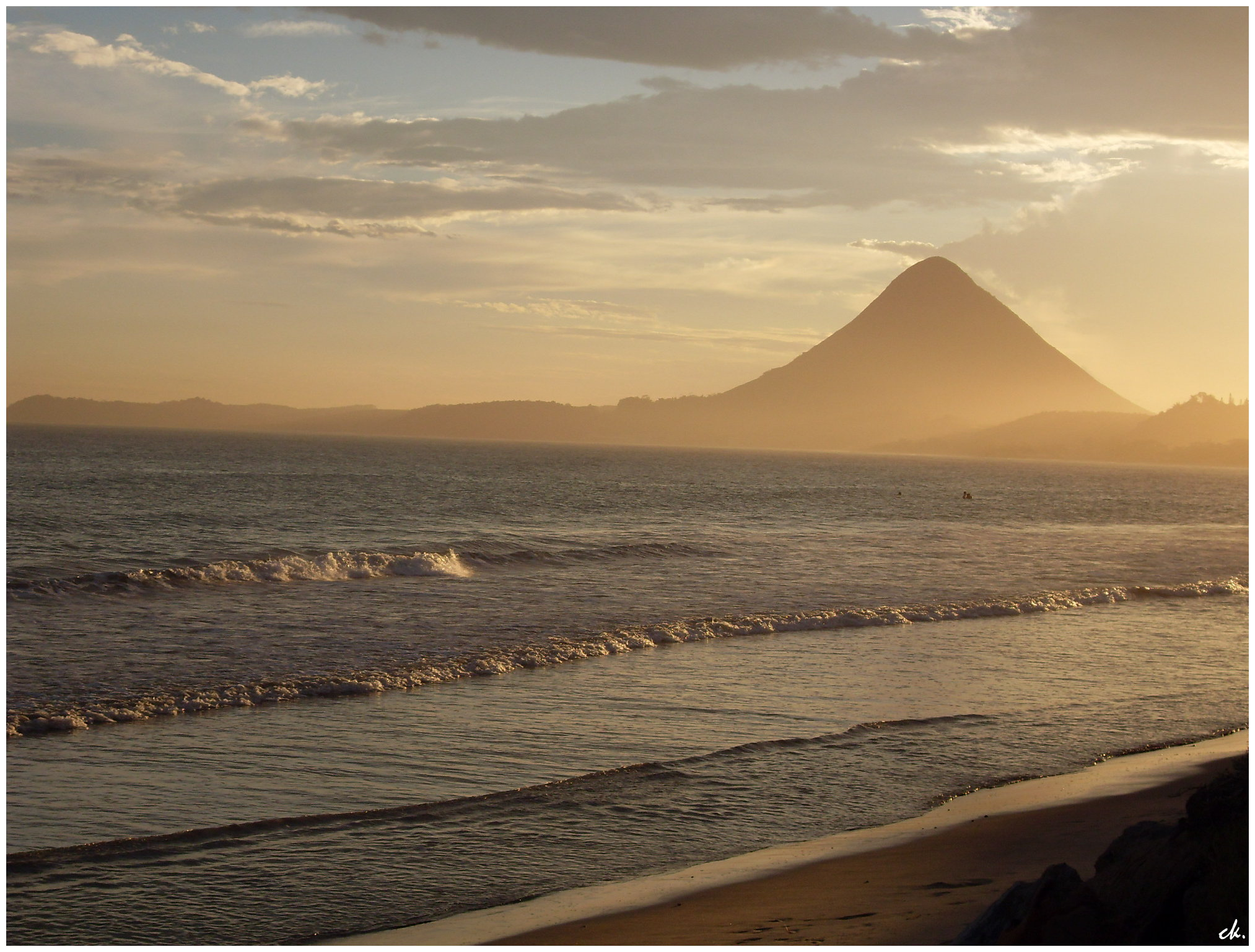 Praia de Piúma, Espírito Santo.